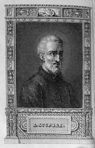 Лоре́нцо Скупо́ли (итал. Laurentius Surius; 1522— 23 мая 1578) — итальянский католический священник, театинец, философ и писатель, автор книги «Il combattimento spirituale» («Брань духовная»)